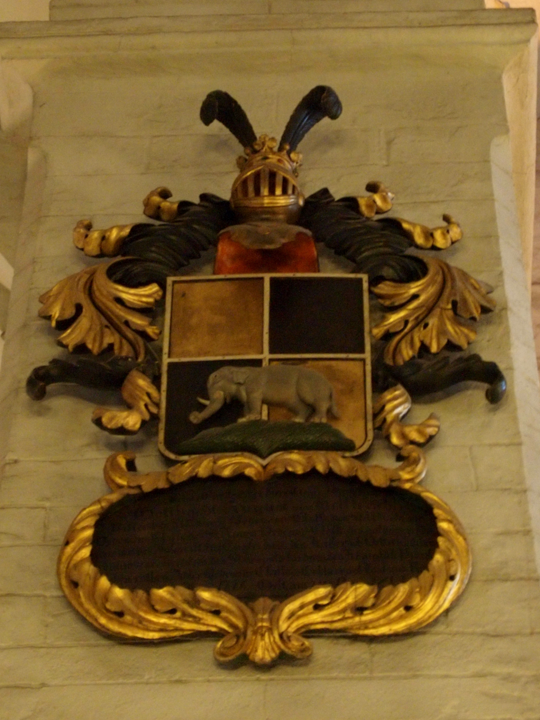 Gotthard August von Helffreichi vappepitaaf Tallinna Toomkirikus